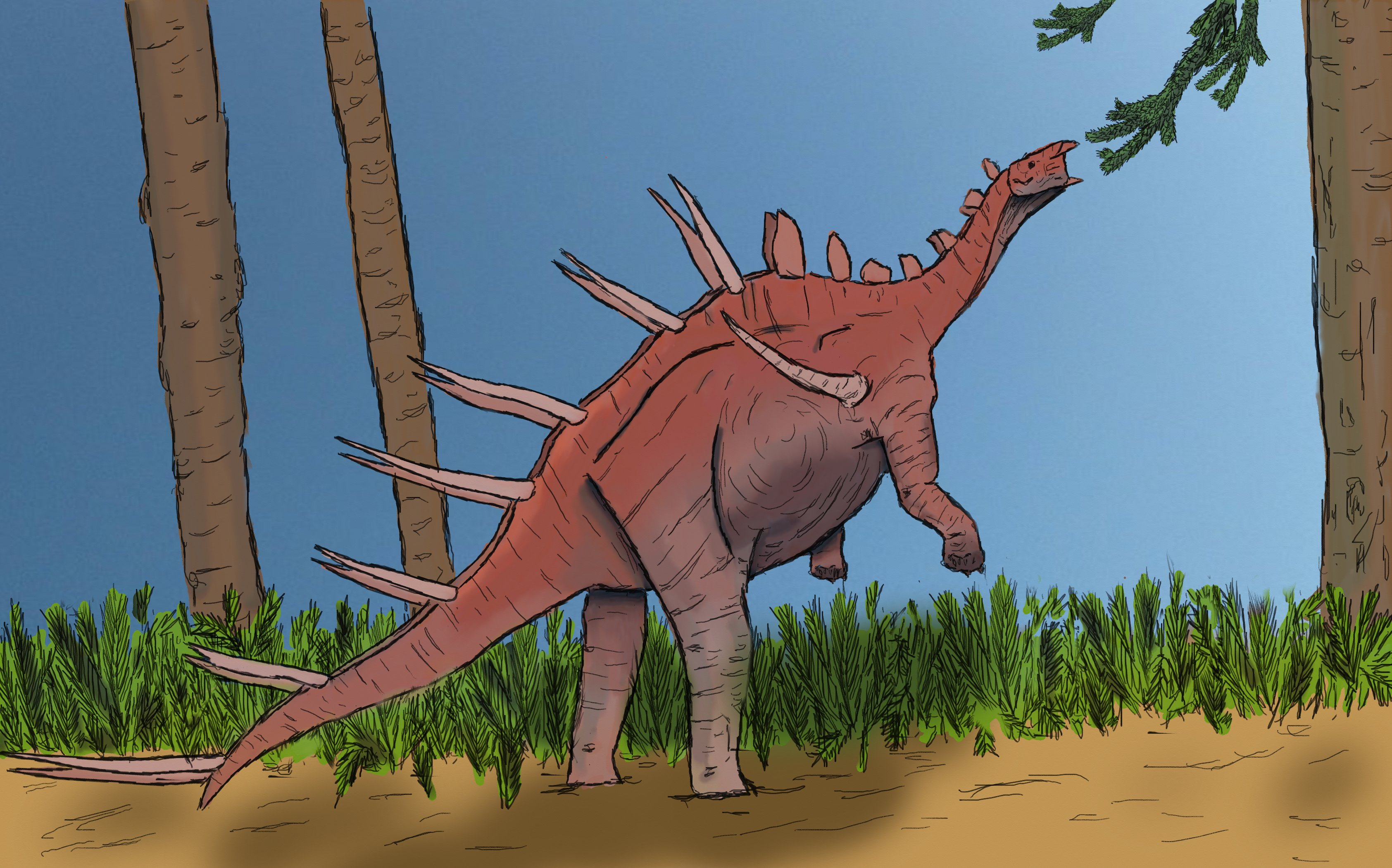 Reconstitution de Kentrosaurus se levant sur ses pattes arrières pour atteindre sa nourriture.